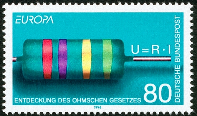 La découverte de la Loi d'Ohm.